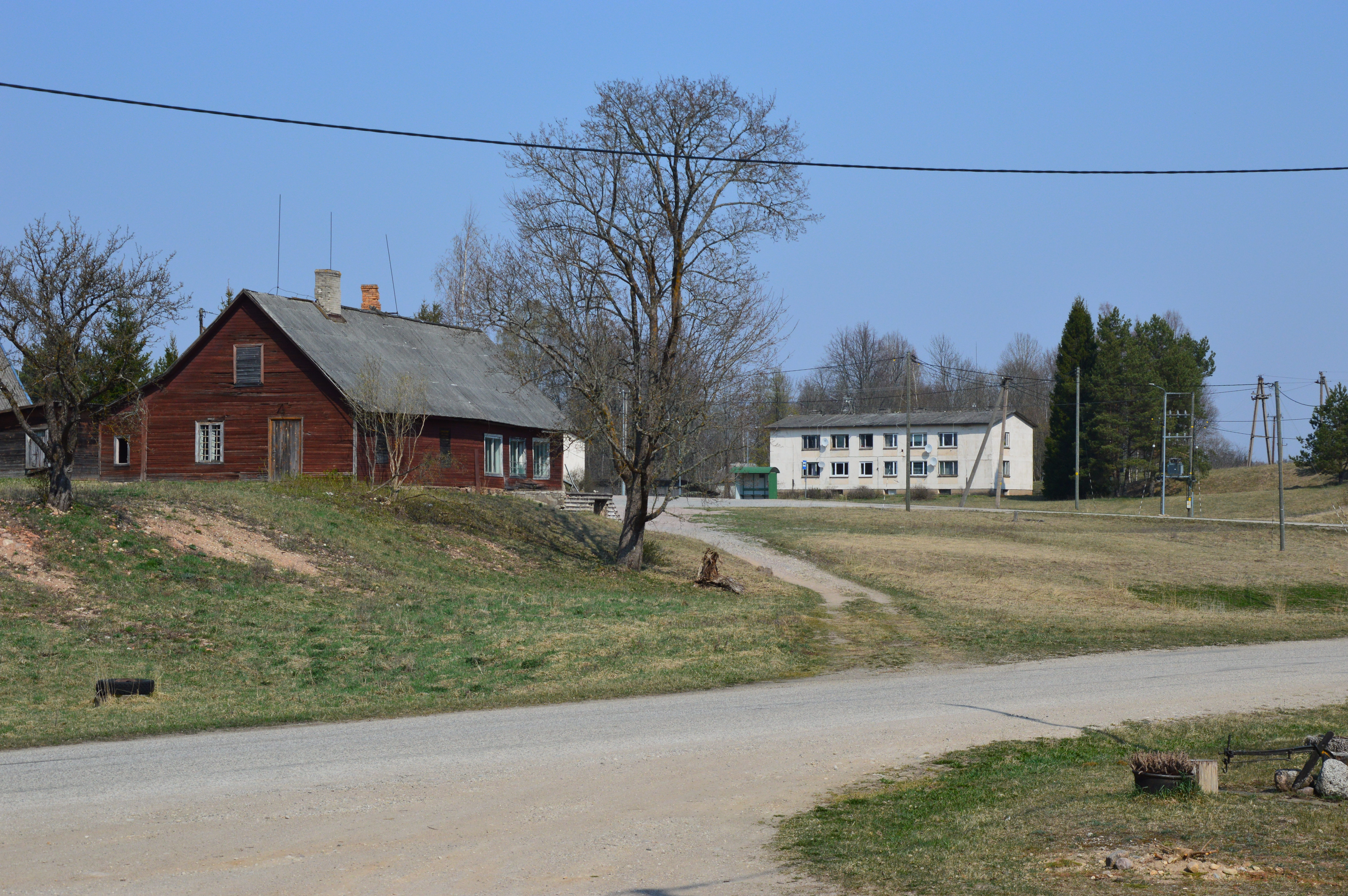 Krabi küla. Vaade Krabi poe juurest.